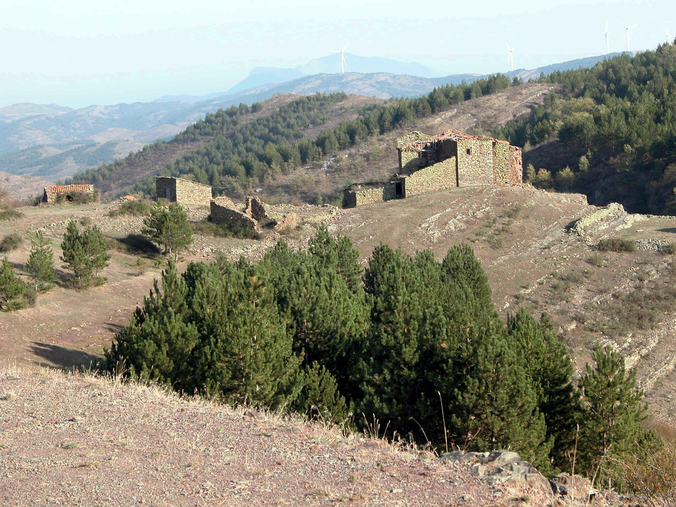 La Monjía, despoblado de Munilla en La Rioja - España.